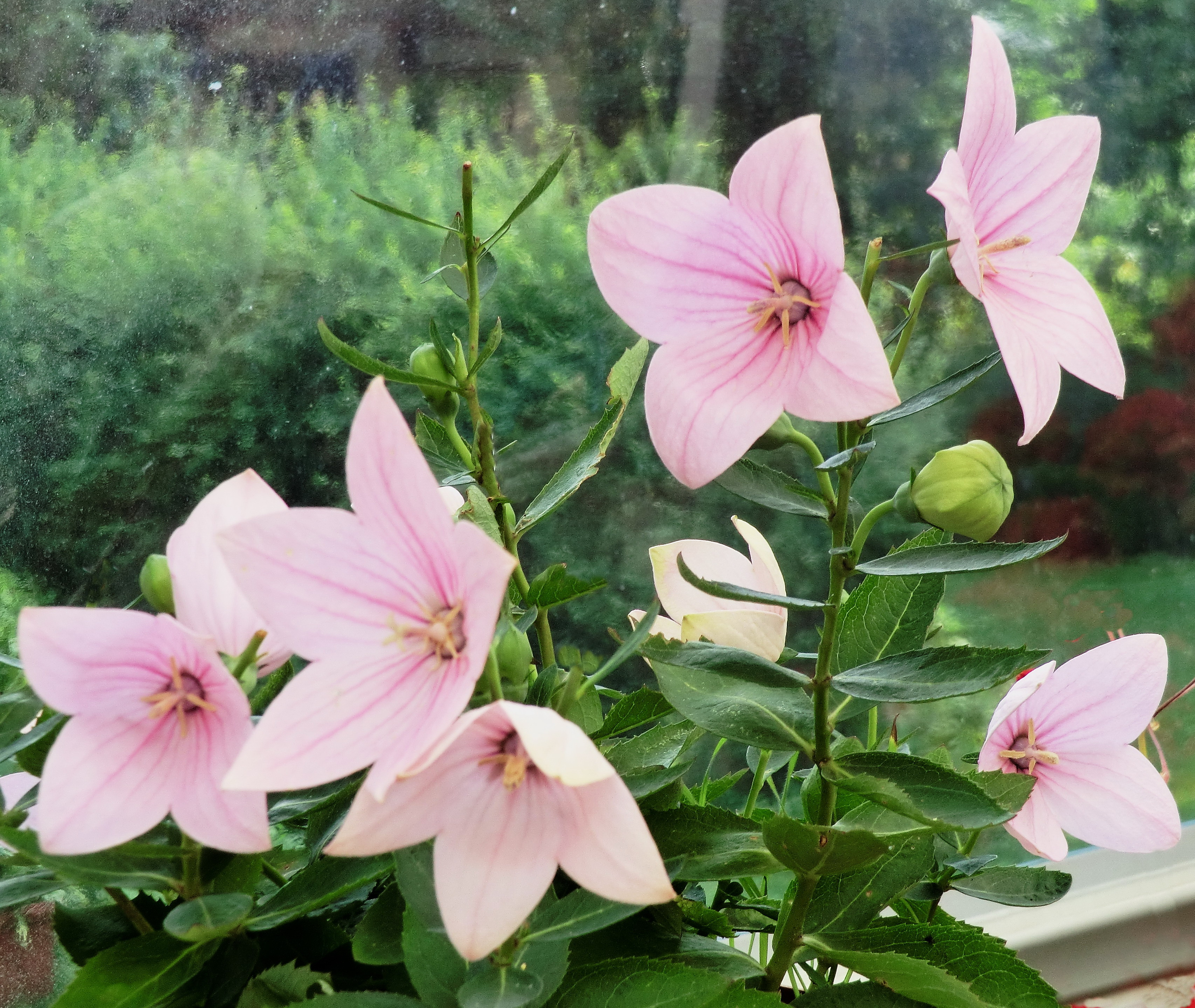 Ballonblume mit 4-zähligen Blüten